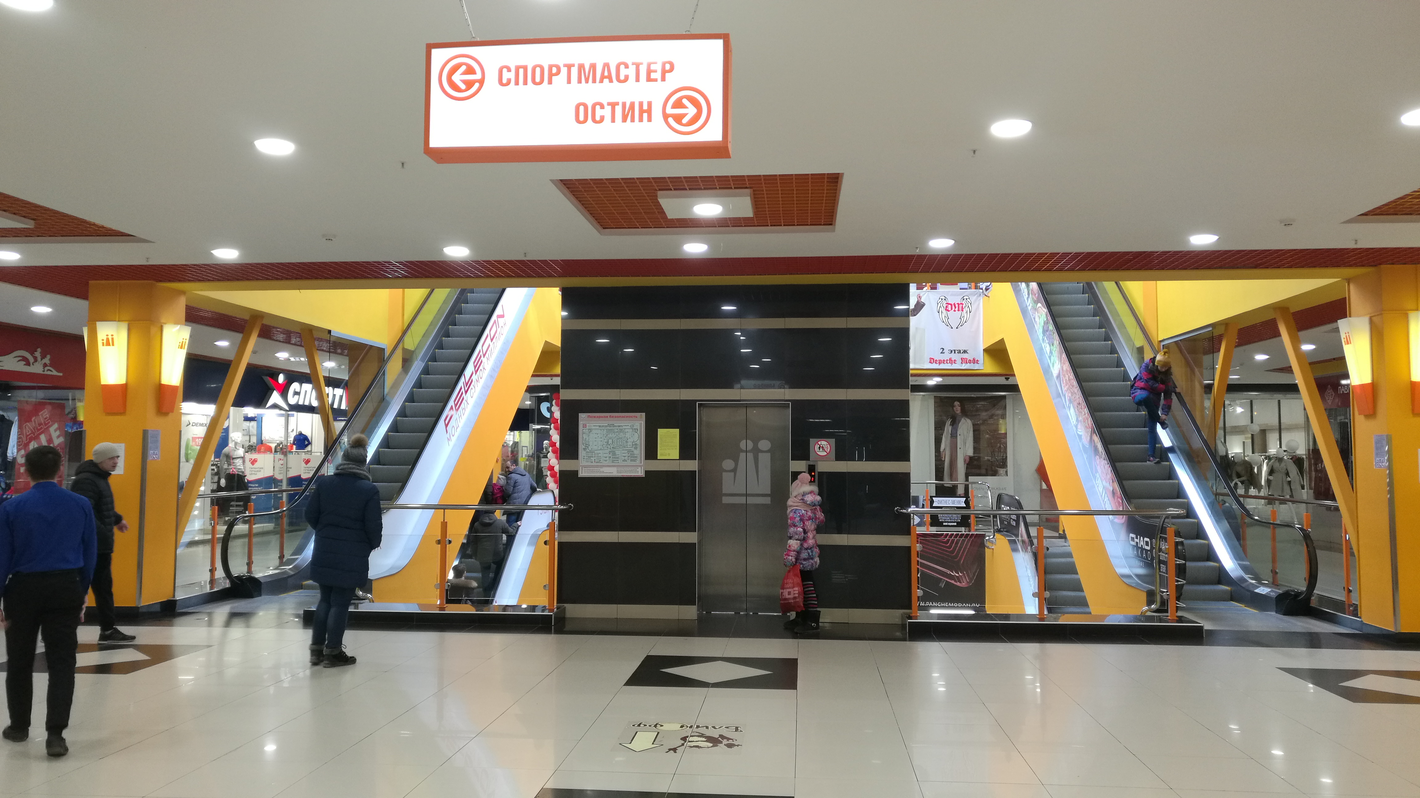 La aĉetcentro "Premier". Tjumeno, Rusio.